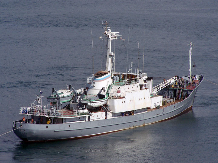 Гидрографическое исследовательское судно «Челекен». Проект 861. Севастополь. Черноморский флот РФ.